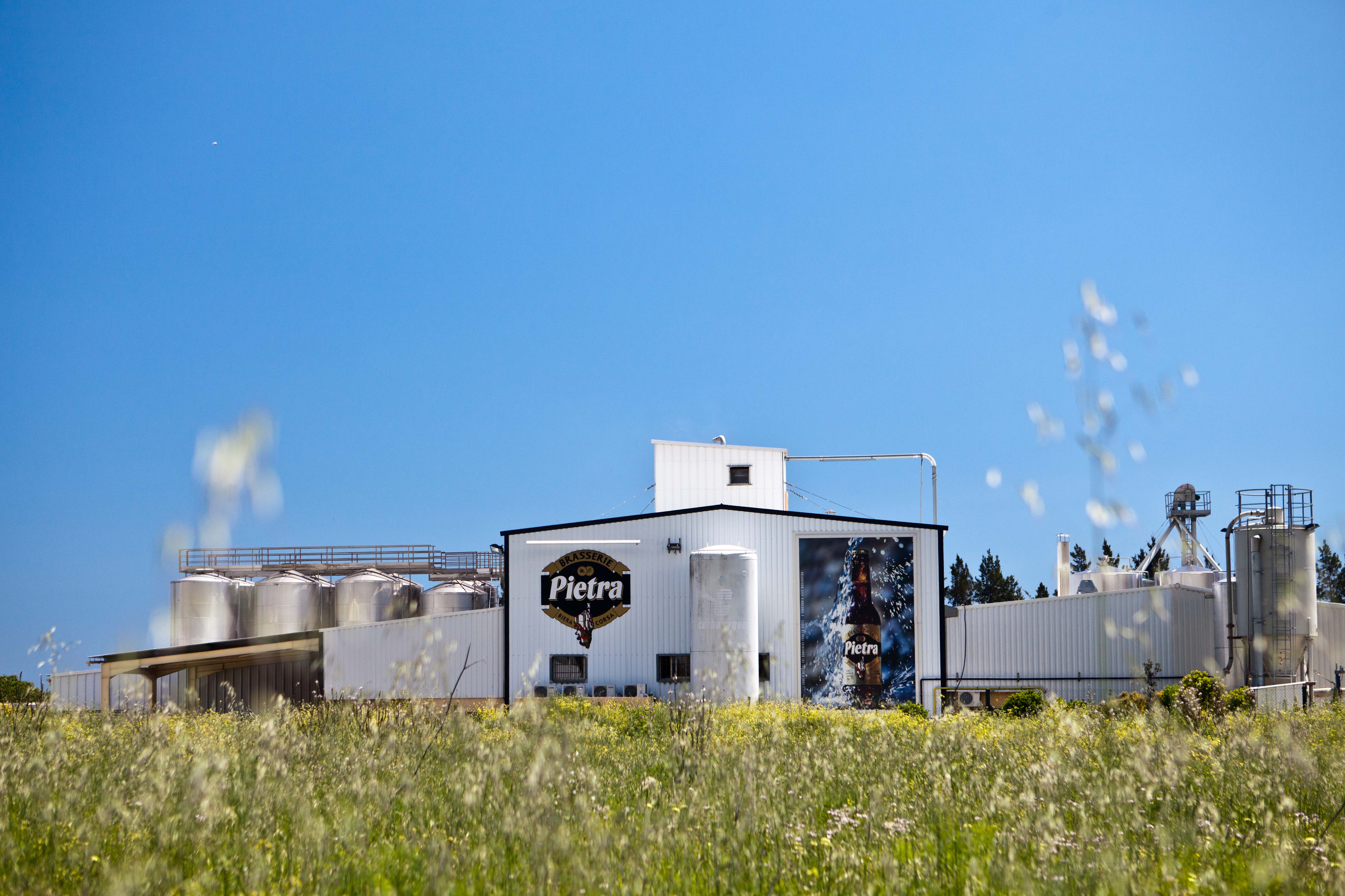 Vue de la Brasserie Pietra située à Furiani (Haute-Corse).